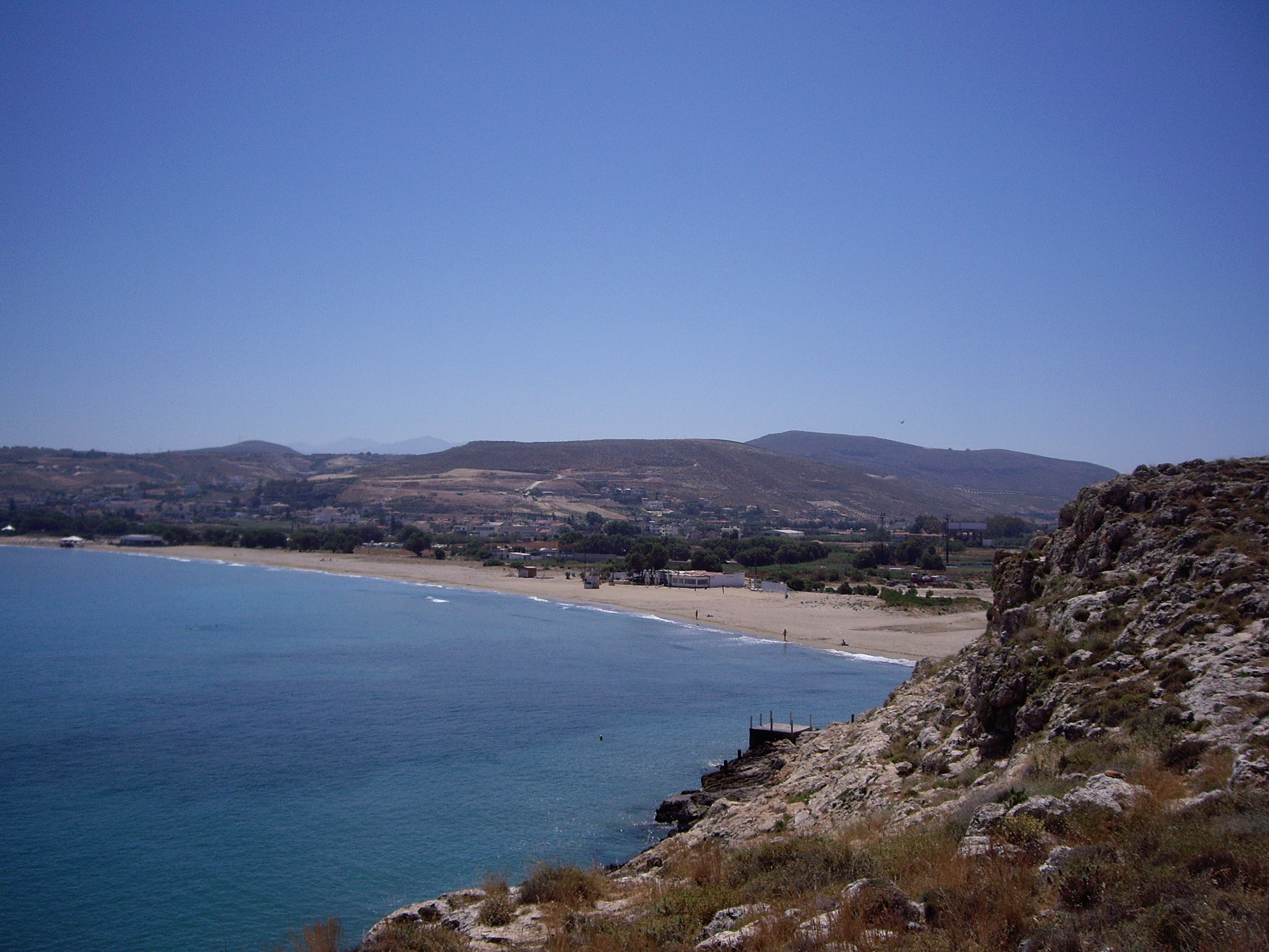 Amnissos